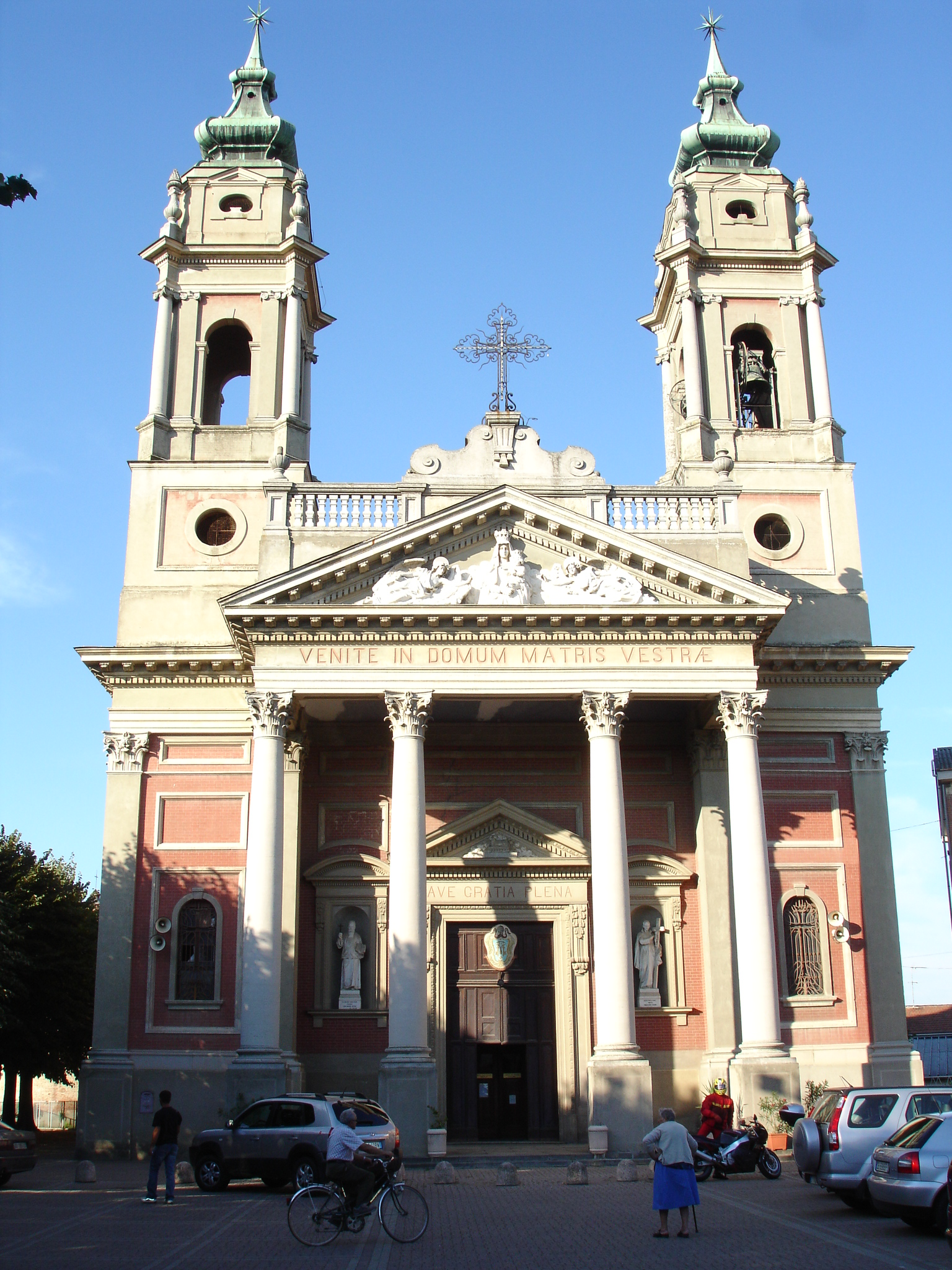 Autore: Tony Frisina